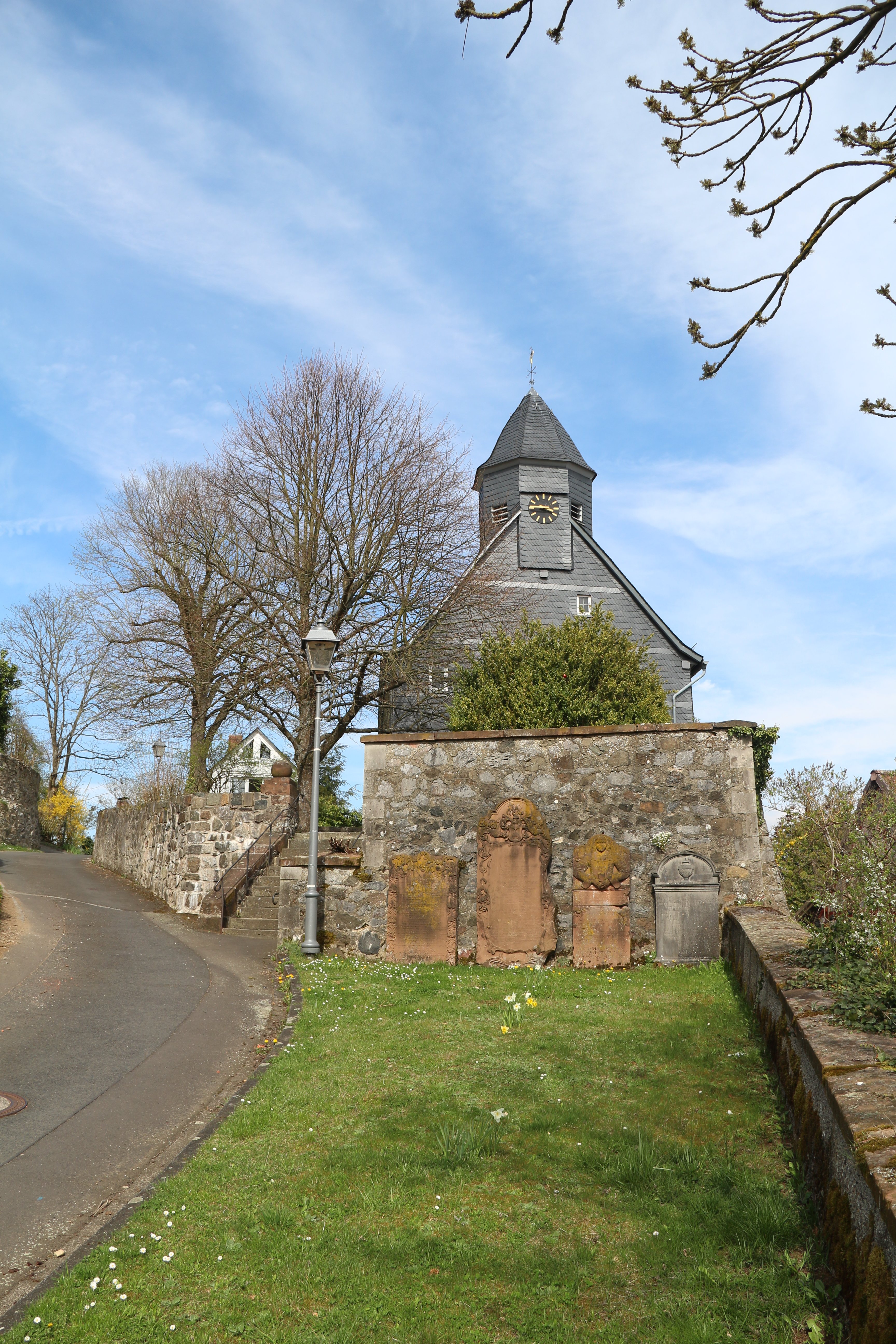 Königsberg